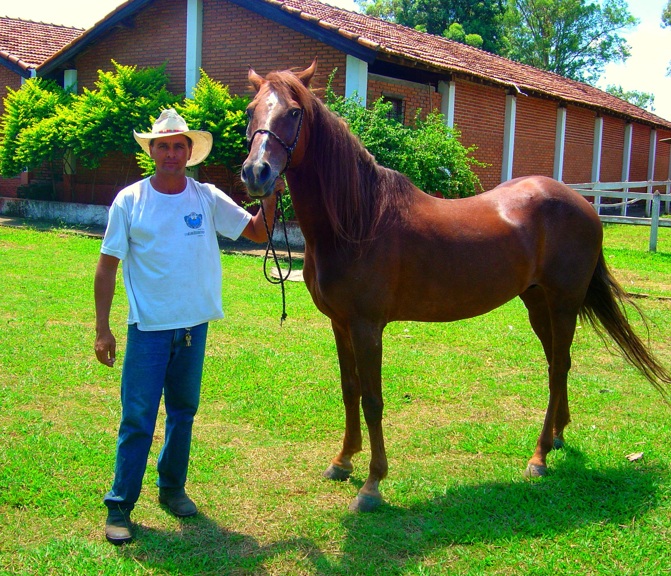 Mangalarga